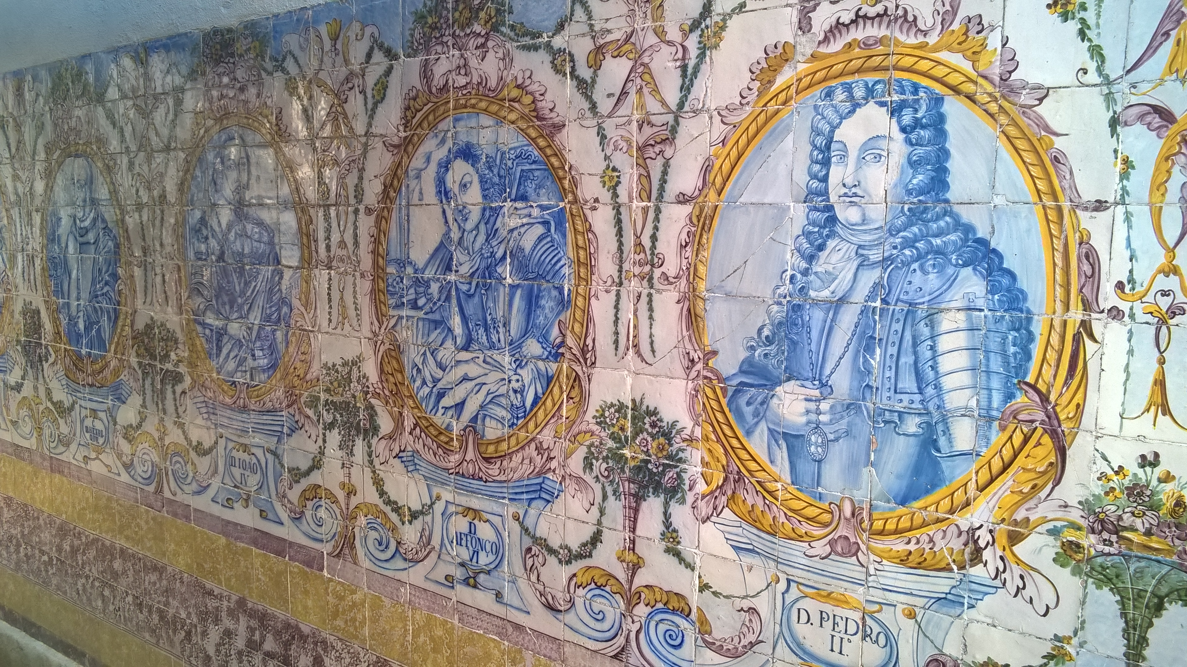 Representação dos bustos de quatro reis portugueses pela ordem que reinaram, sendo o mais à direita D. Pedro II